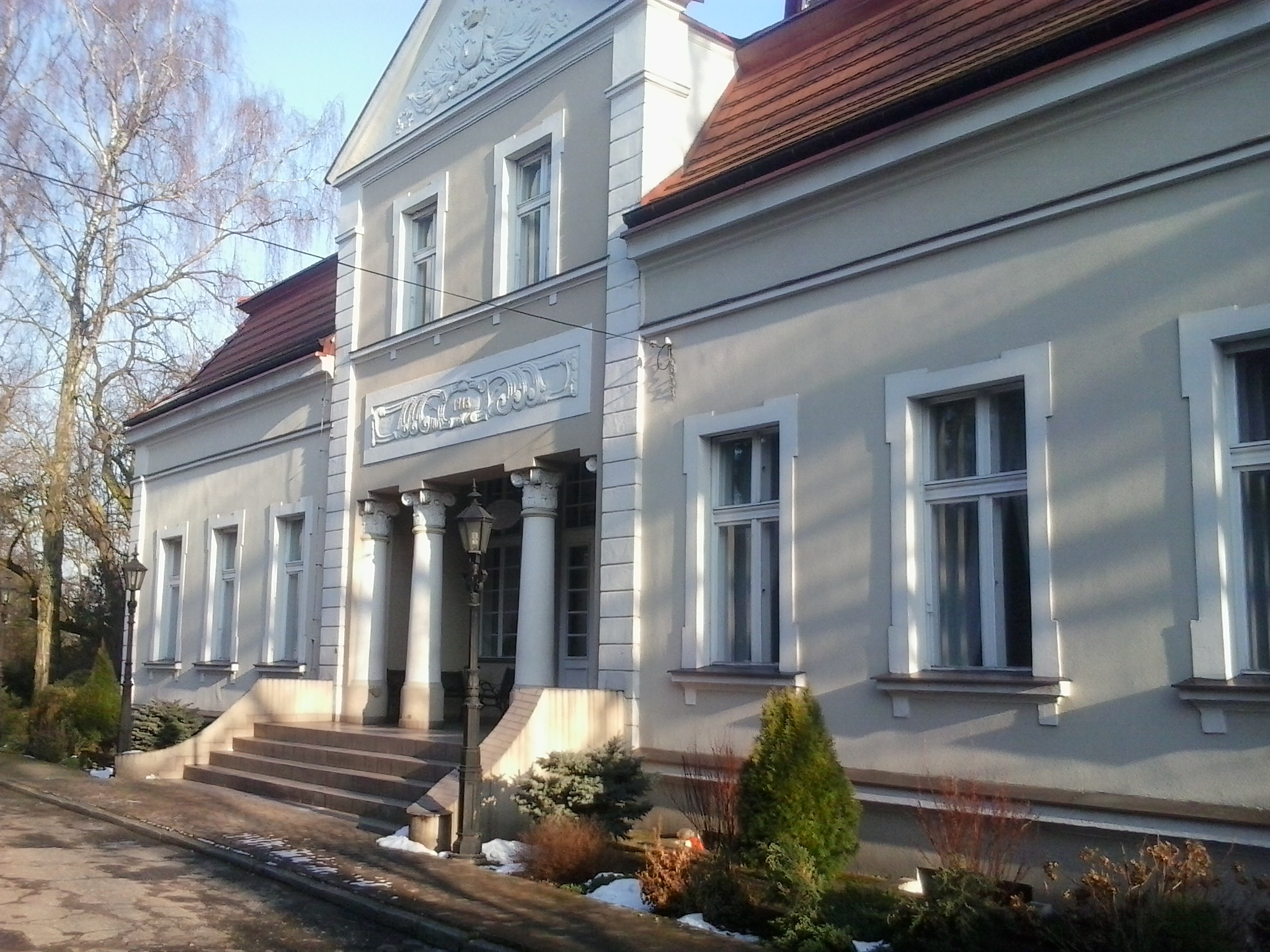 Zabytkowy pałac z początków XX wieku.